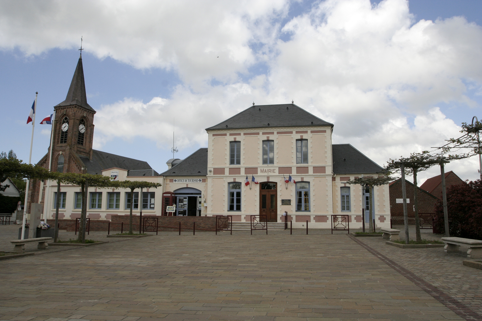 Rang-du-Fliers : mairie, église et office de tourisme.